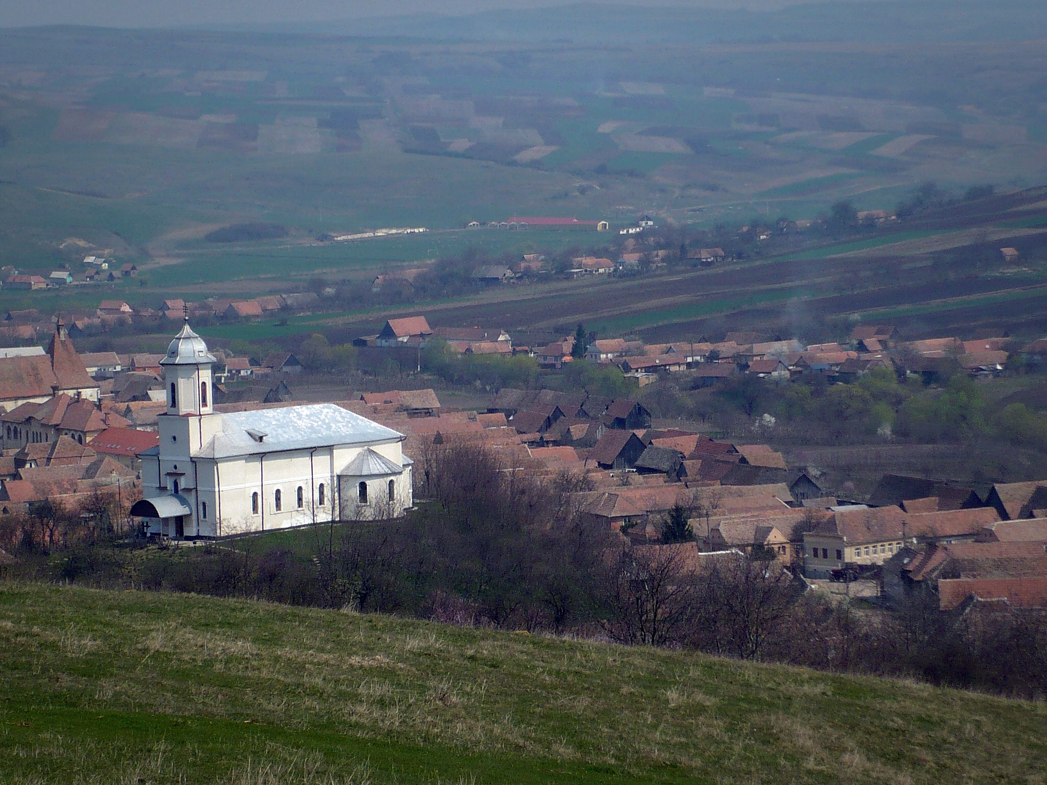 Biserica ortodoxa din Boian, Jud. Sibiu